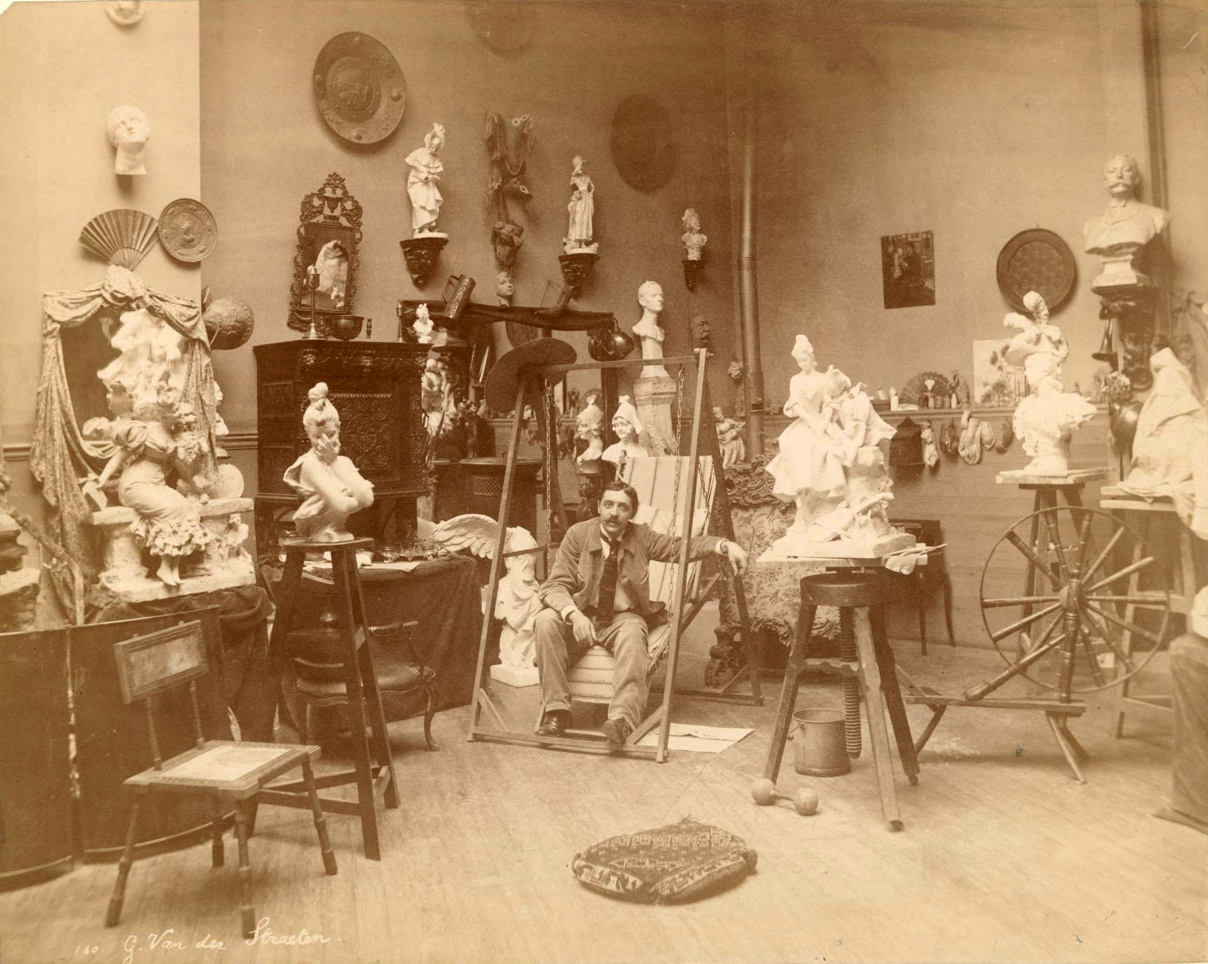 Georges Van der Straeten dans son atelier parisien